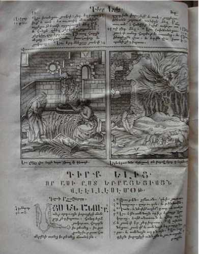 Հատված առաջին տպագրված հայերեն Աստվածաշնչից, Ամստերդամ, 1666